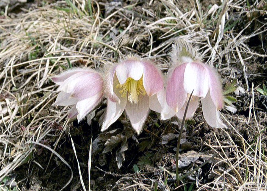 Pulsatilla vernalis, Seiser Alm